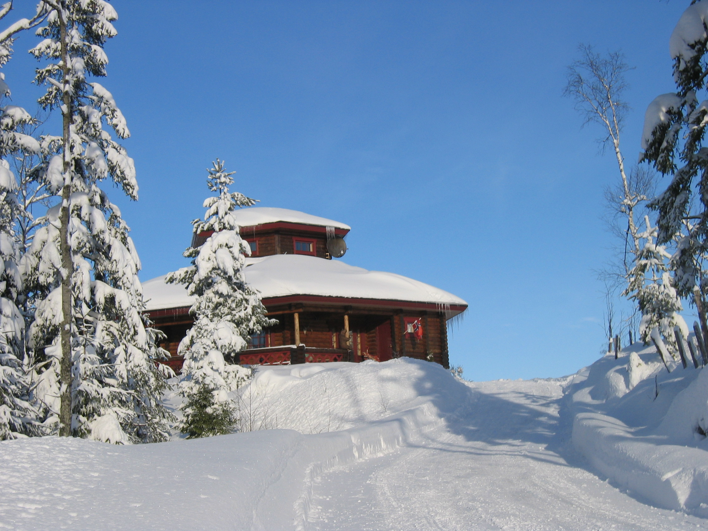 Tårnhuset på Færsnes Gjestegård